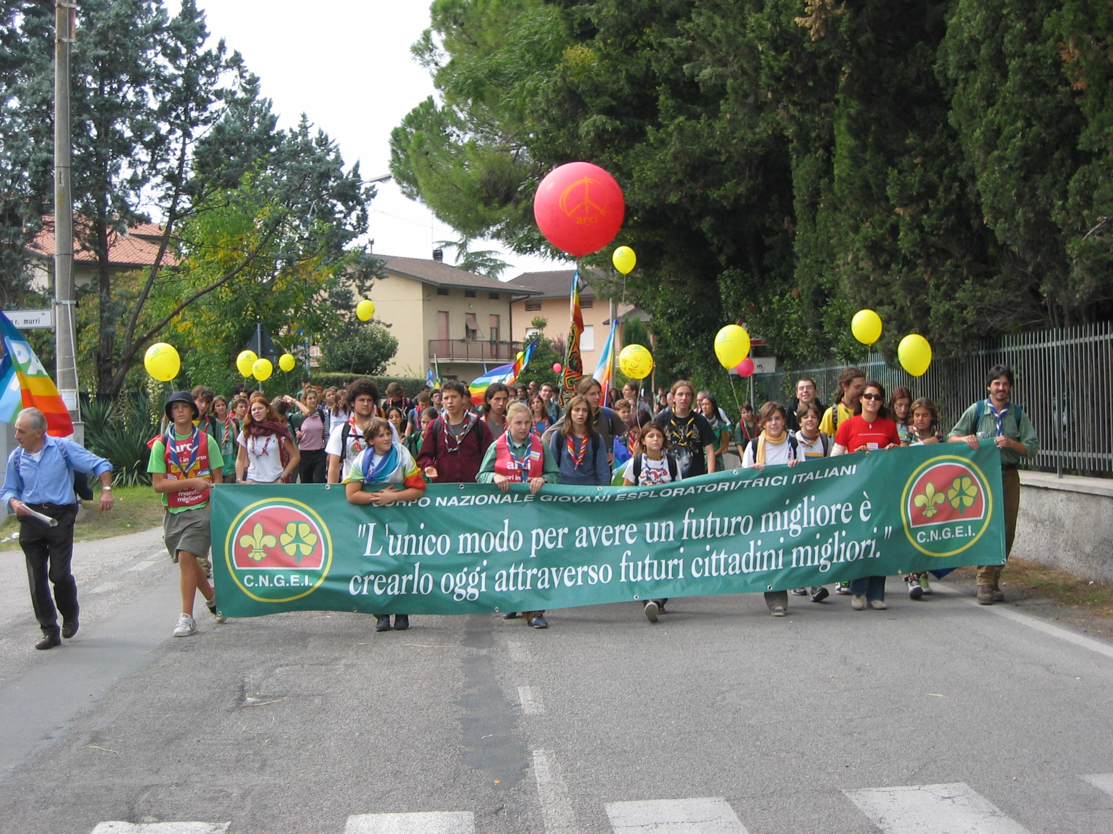 Tra Perugia e Assisi: una rappresentanza di scout del CNGEI alla Marcia della Pace